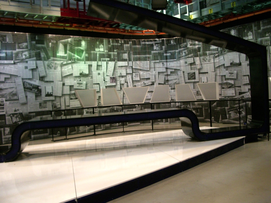 Hrvatska radiotelevizija, Zagreb